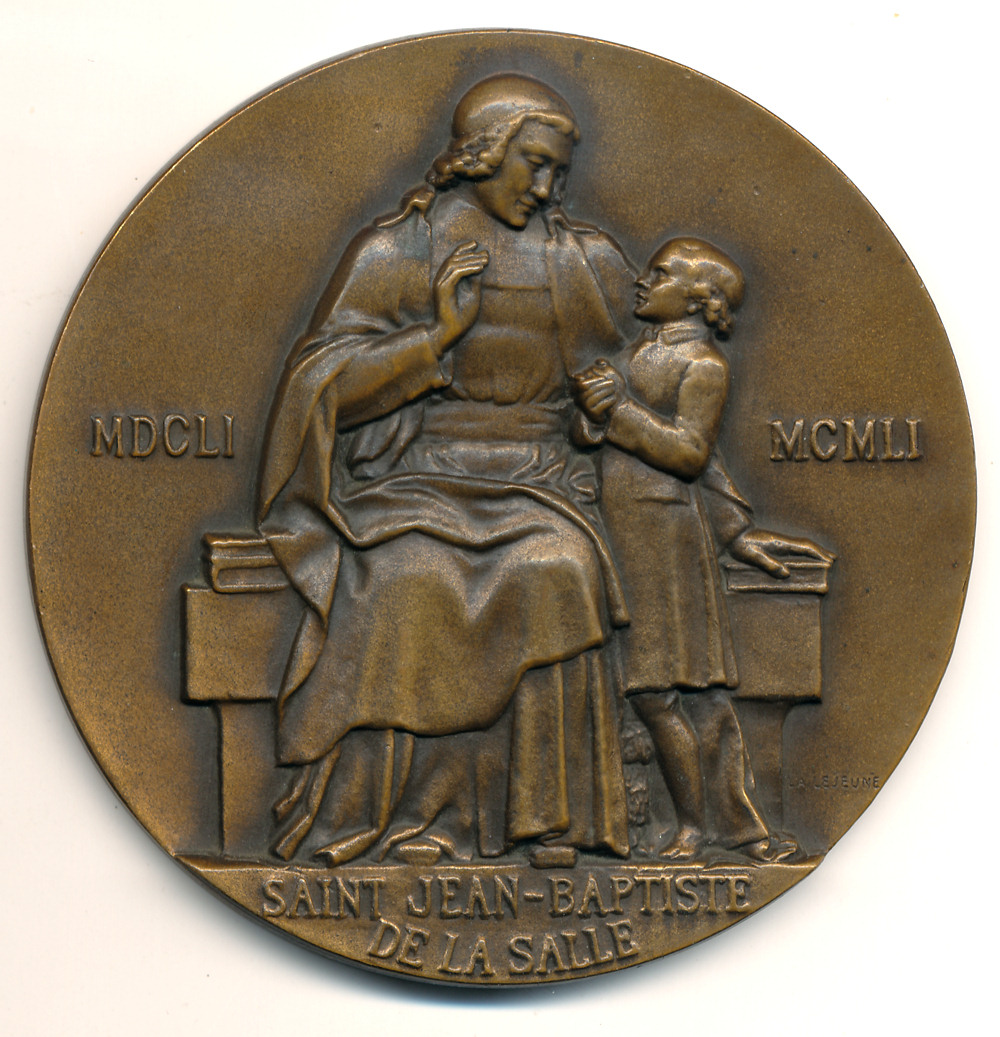 Médaille éditée pour le 3ème centenaire de la naissance de St Jean-Baptiste de la Salle pour le 3ème centenaire de sa naissance en 1951. Signée L.A. Lejeune, bronze 69mm.